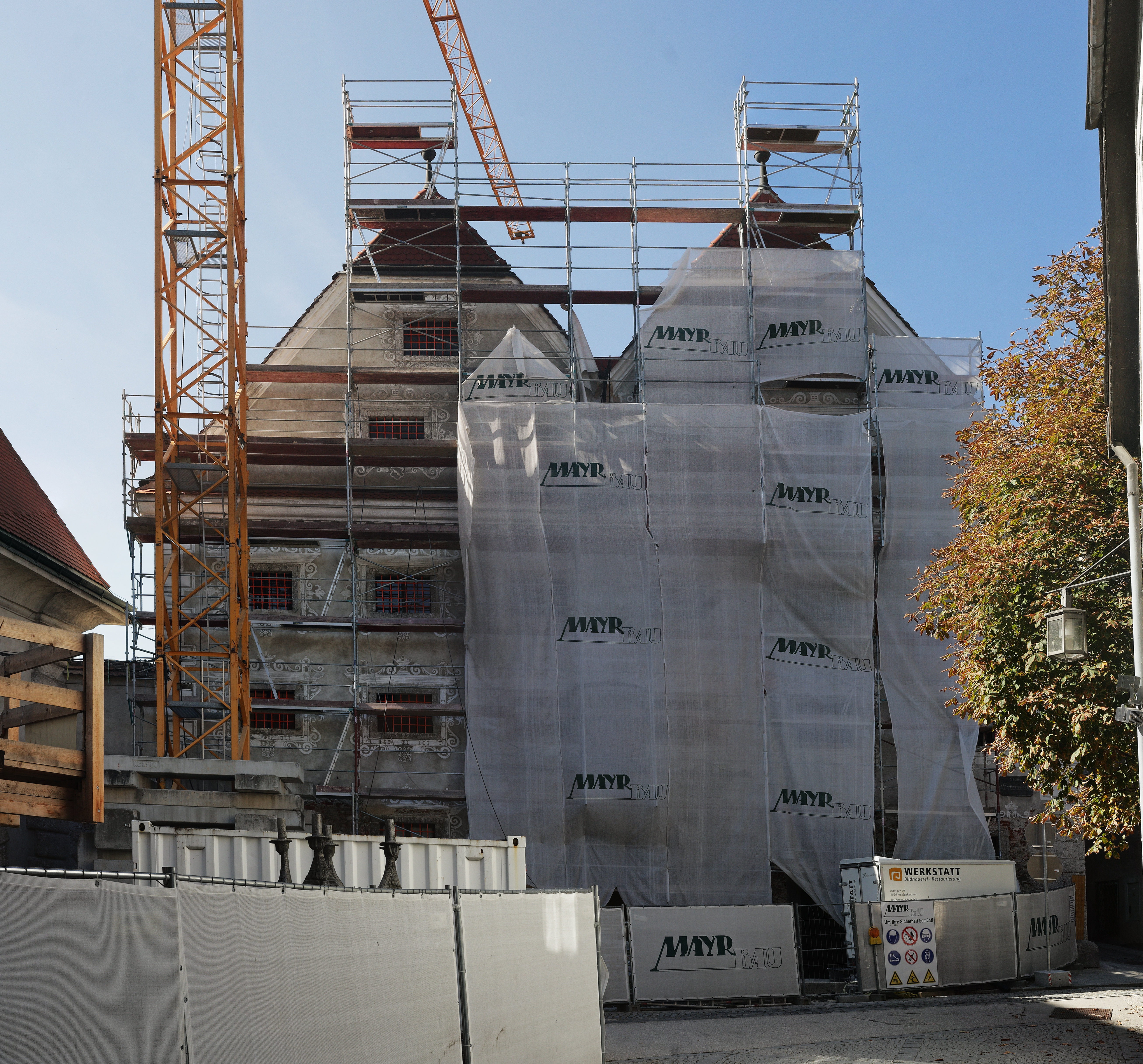 Umbau des Museums der Stadt Steyr für die Landesausstellung 2021: Der eingerüstete Innerberger Stadel.